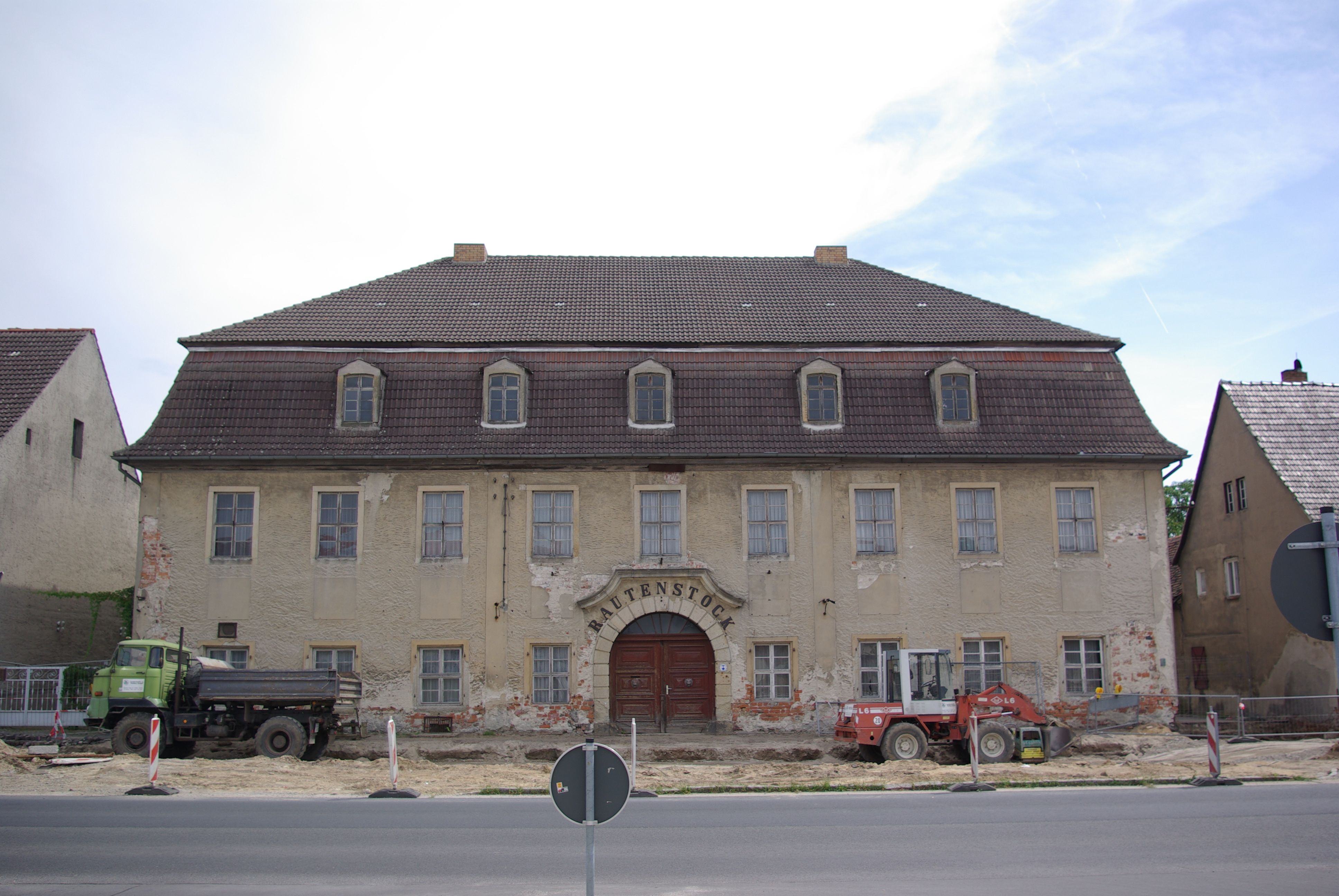 Doberlug-Kirchhain in Brandenburg. Das ehemalige Gasthaus Rautenstock in der Hauptstraße des Ortsteils Doberlug steht unter Denkmalschutz.